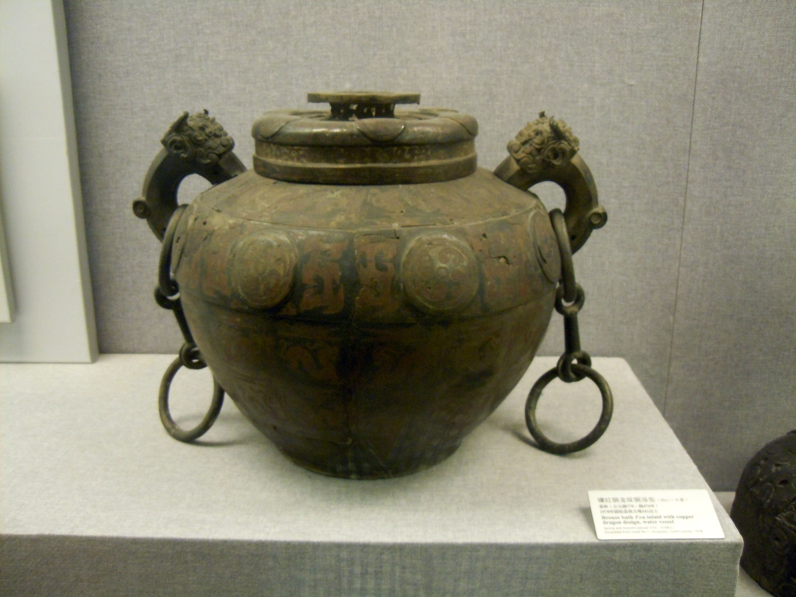 出土于河南省固始县侯古堆一号墓的镶红铜龙纹铜浴缶